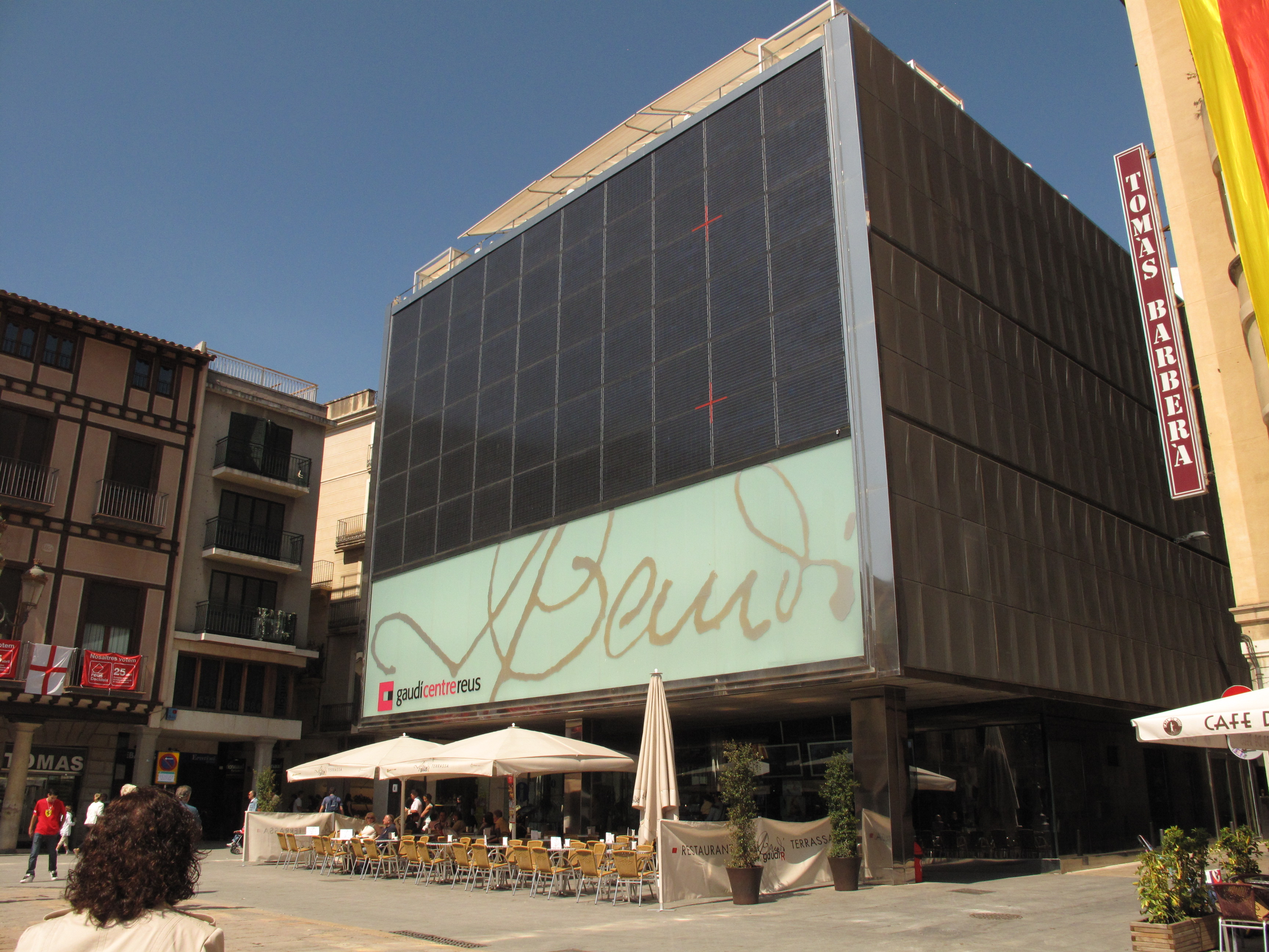 Plaça del Mercadal (Reus)